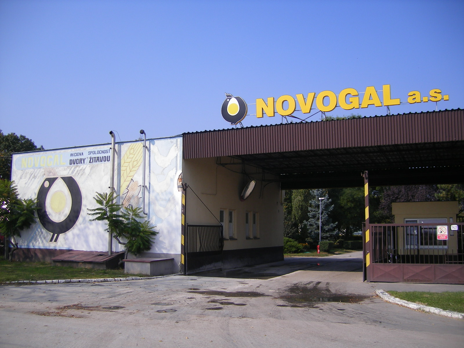 Udvard - a Novogal Rt. csirketelepe